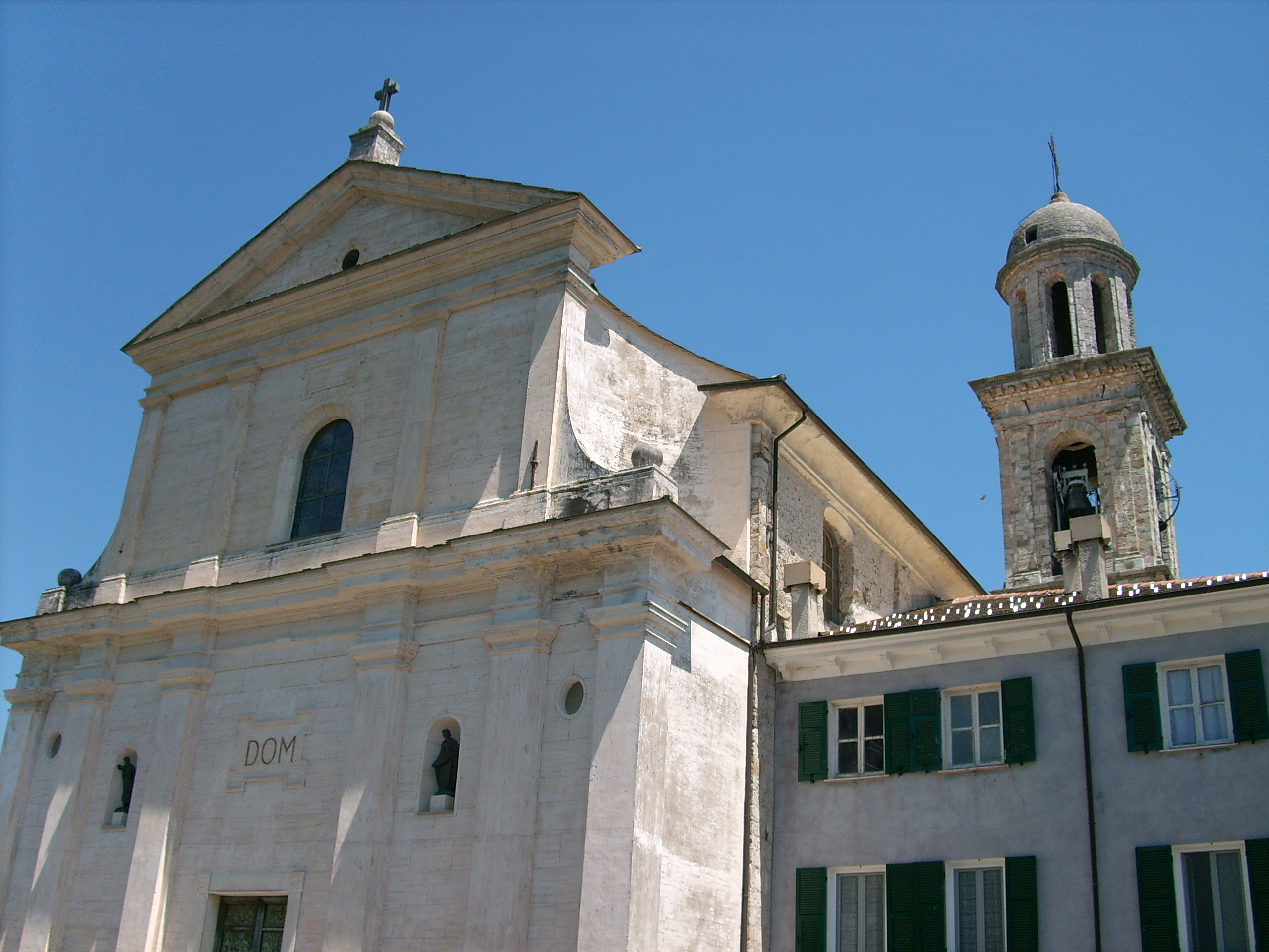 Chiesa di san Giovanni Battista di Rovegno, Liguria, Italia